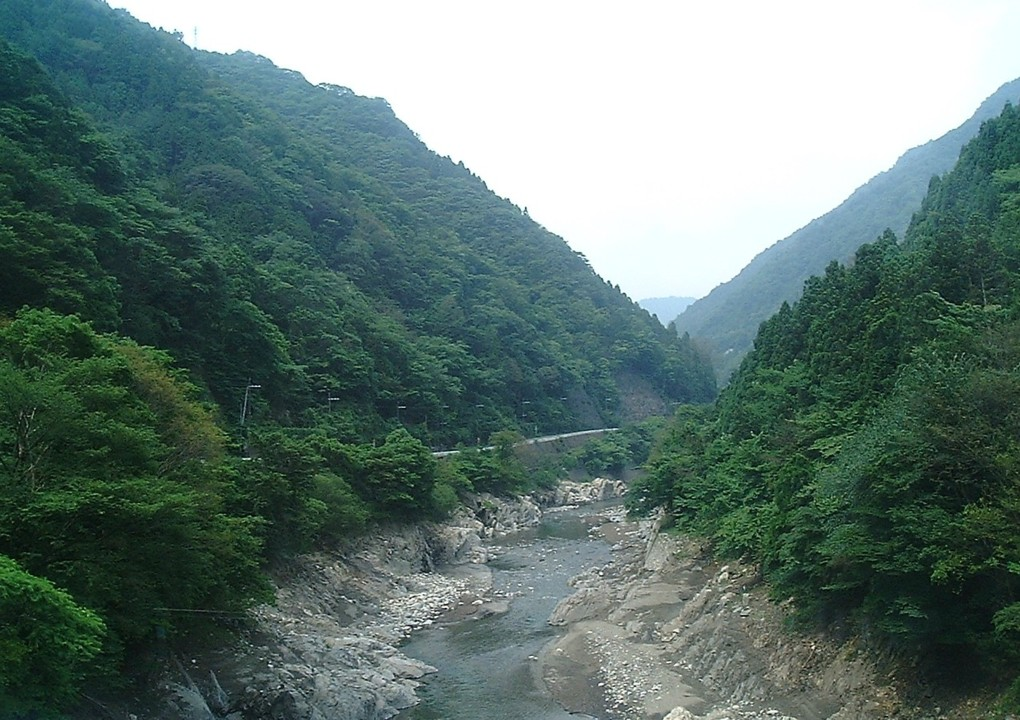 愛知川上流部。滋賀県ja:東近江市（撮影当時は神崎郡ja:永源寺町）